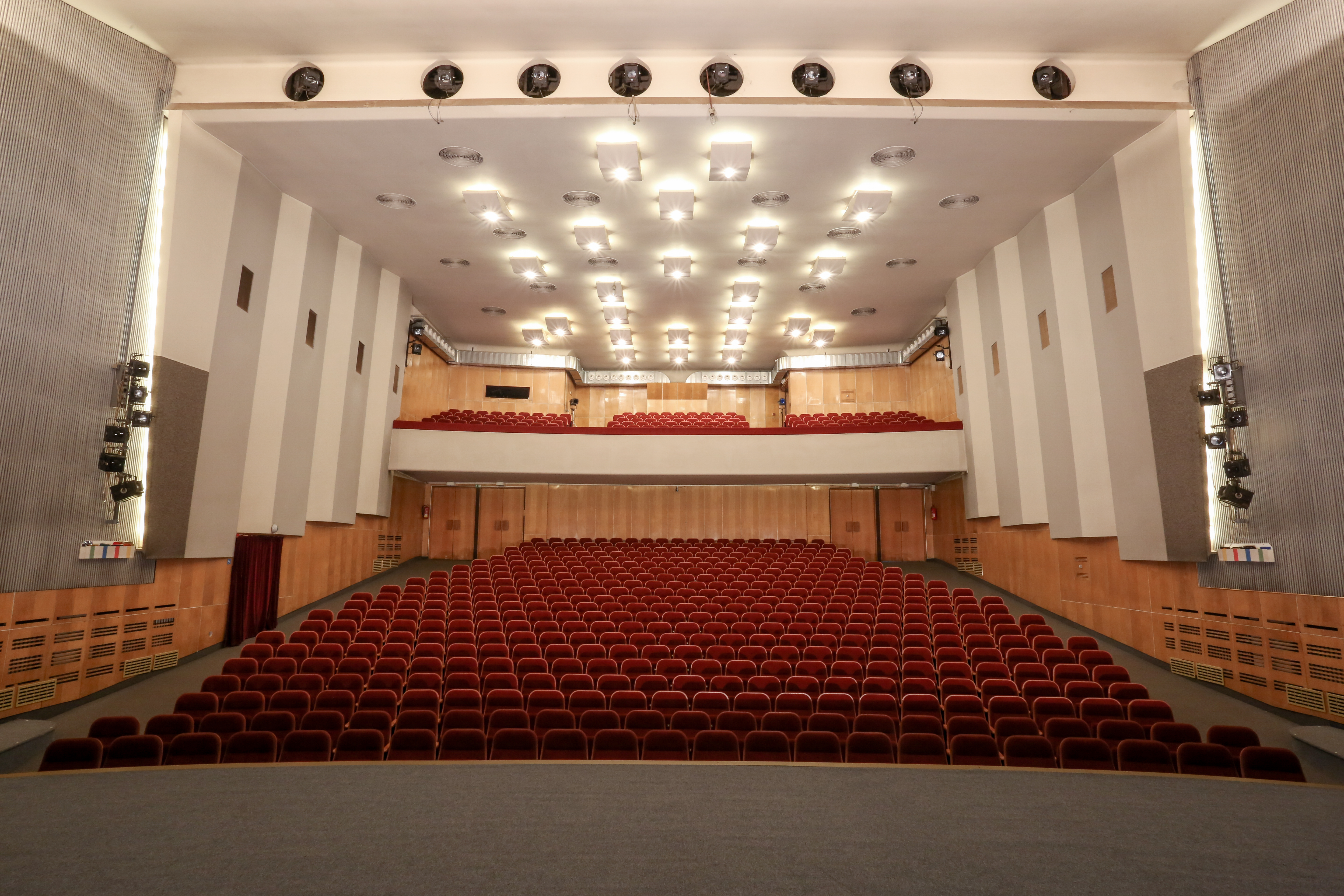 nový sál